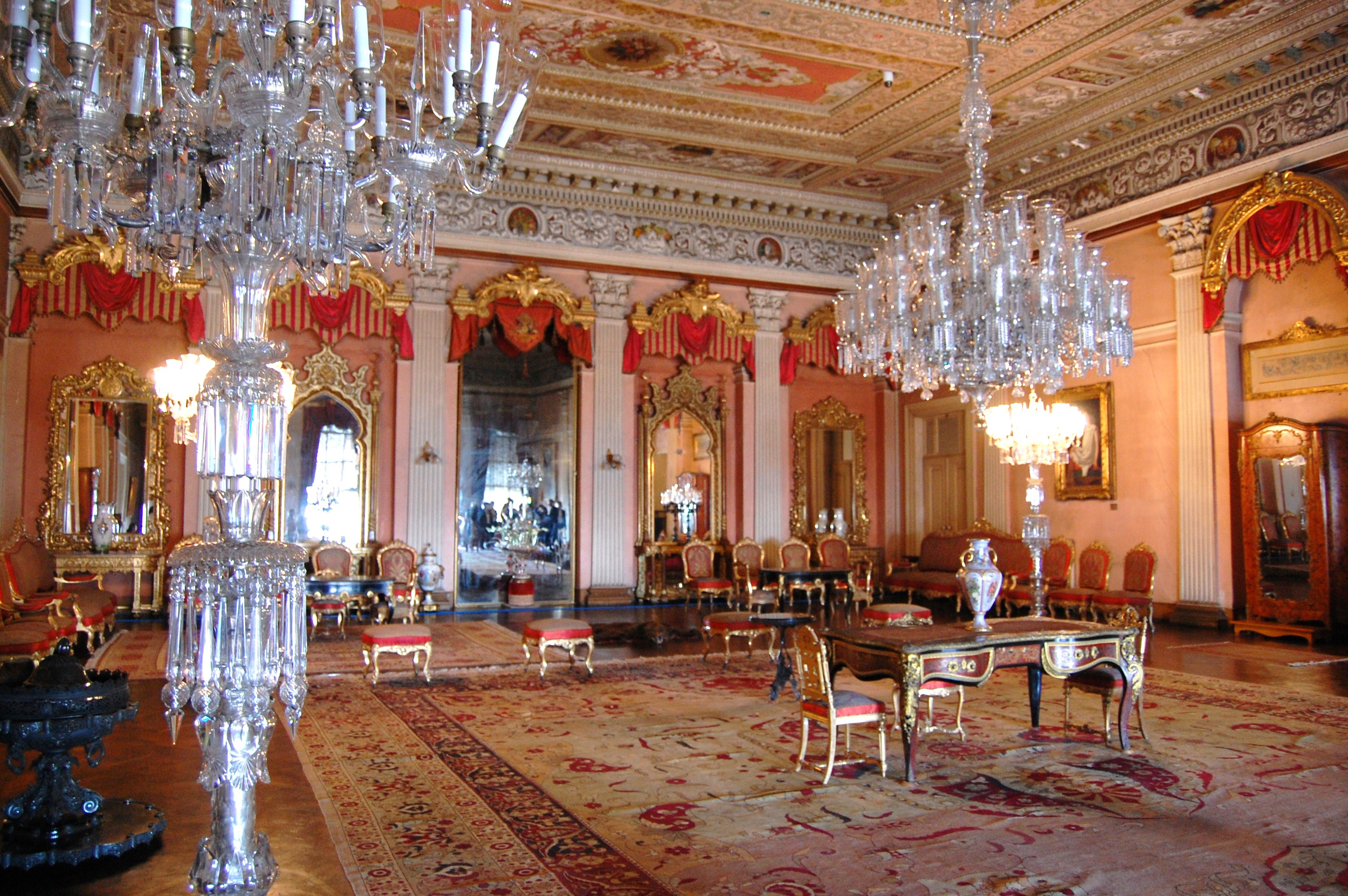 Dolmabahçe Palace